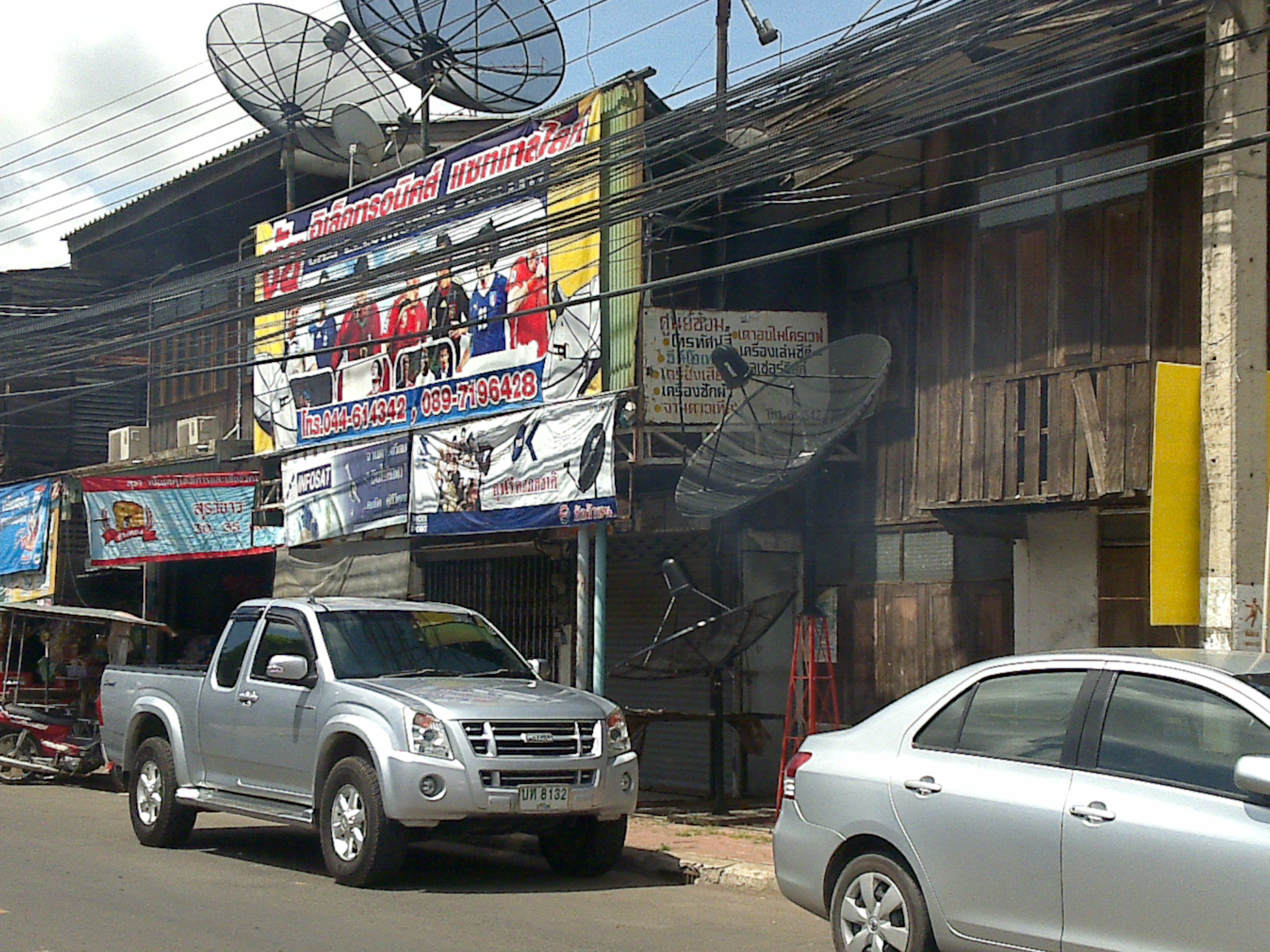 บ้านไม้เก่าในบุรีรัมย์